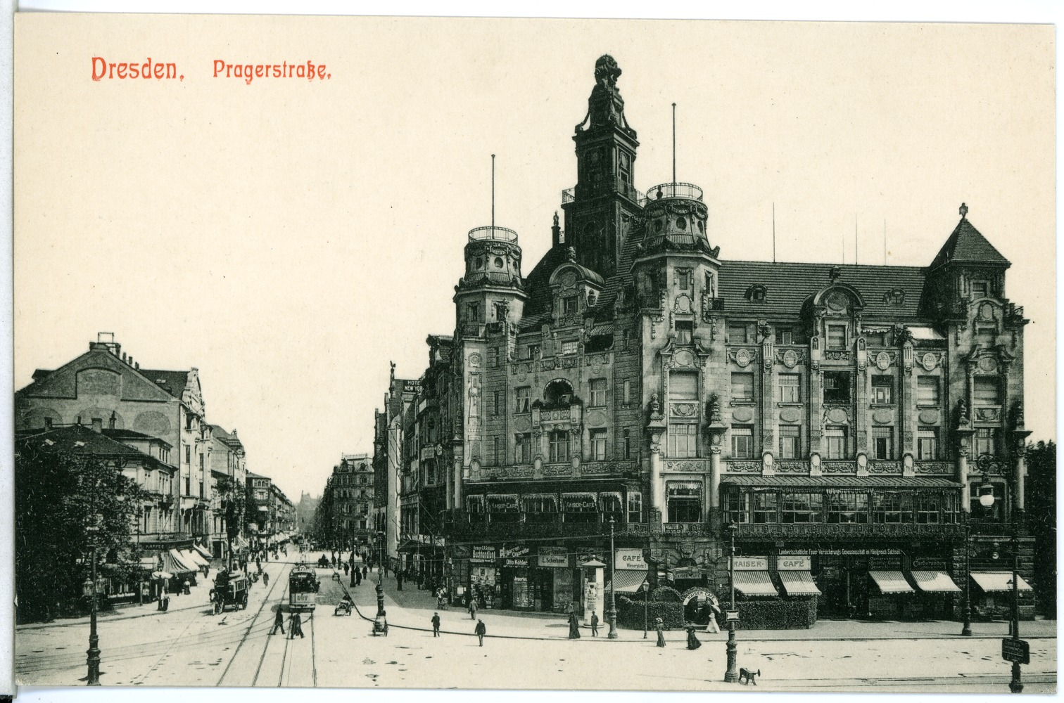 Dresden; Prager Straße This postcard is from publisher Brück & Sohn in Meißen ( postcard has a unique number 10729 and is available in a higher resolution at the publisher. This images was uploaded in a cooperation project between Wikipedians and the publisher.